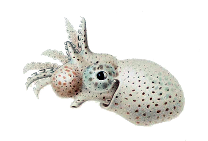 Argonauta hians male